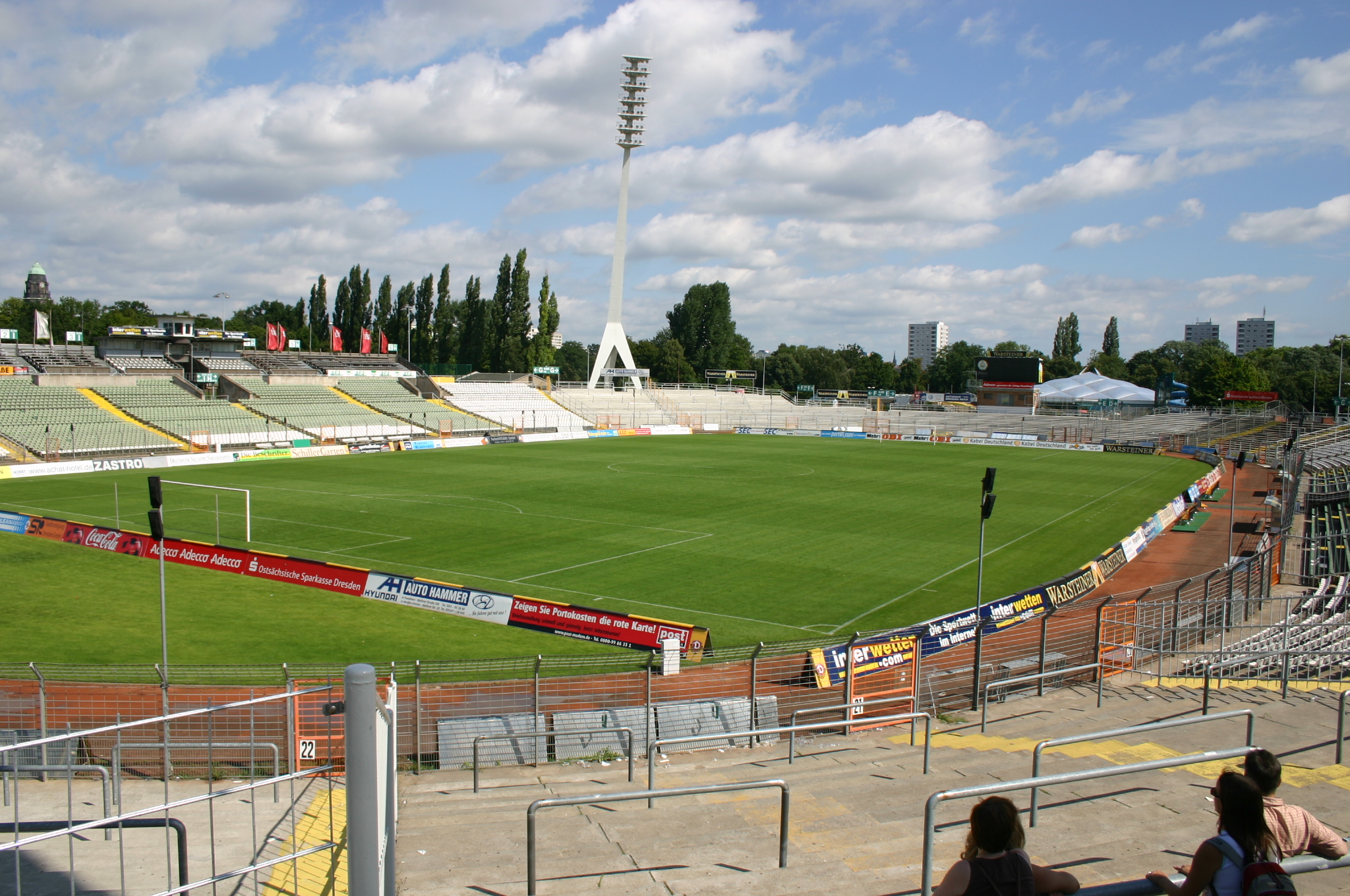 Rudolf-Harbig-Stadion in Dresden, with Canon EOS 300D